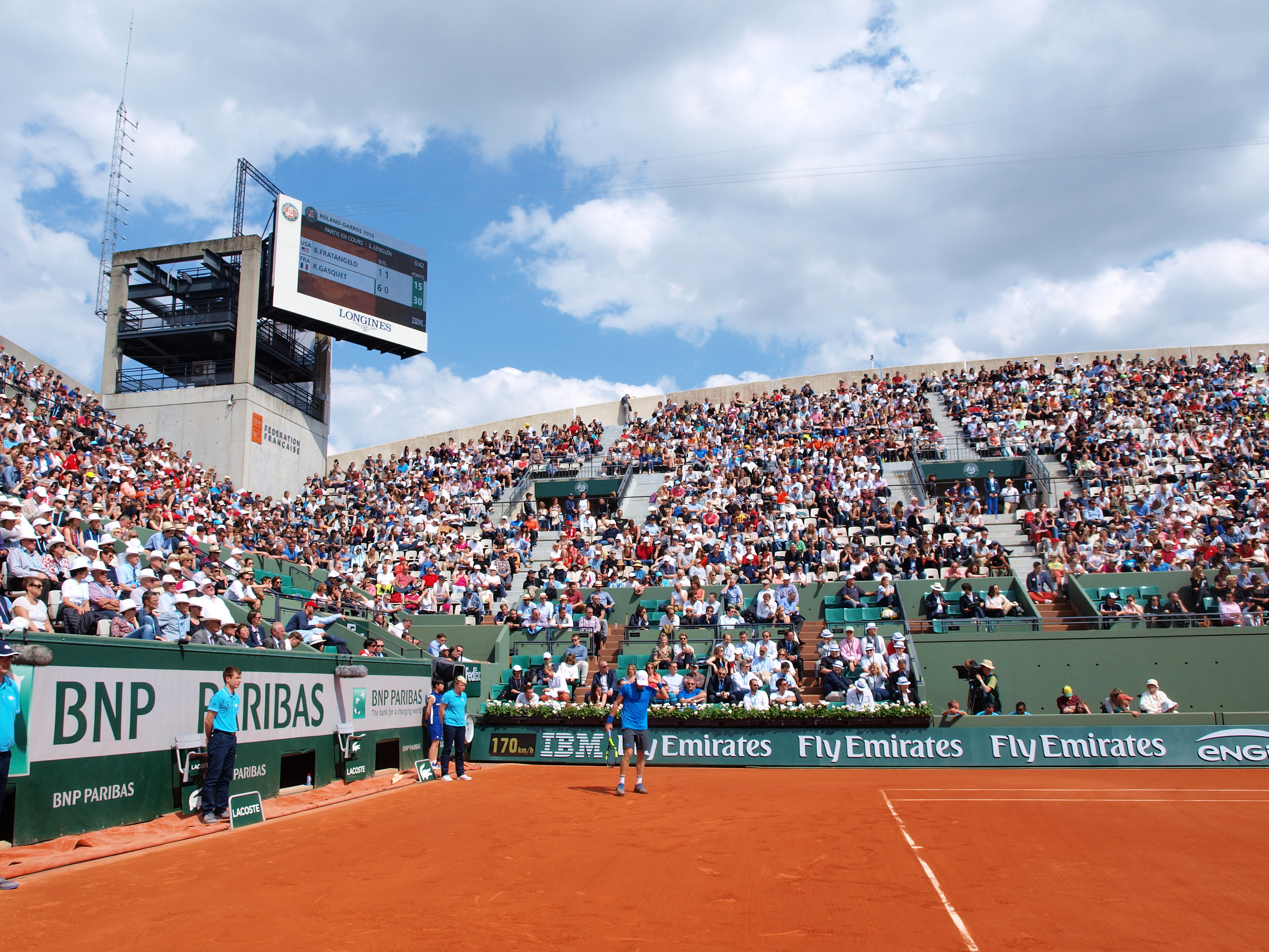 Lors des internationaux de France de tennis, sur le court Lenglen du stade Roland Garros, à Paris, le 25 mai 2016.